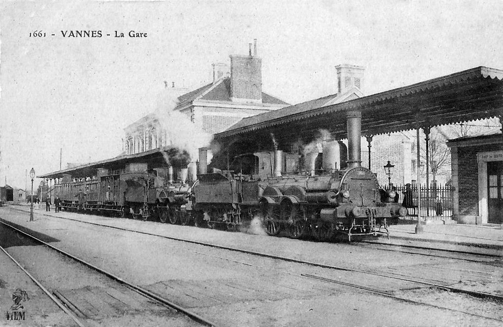 Intérieur de la gare vers 190 avec un train et deux locomotives à vapeur.